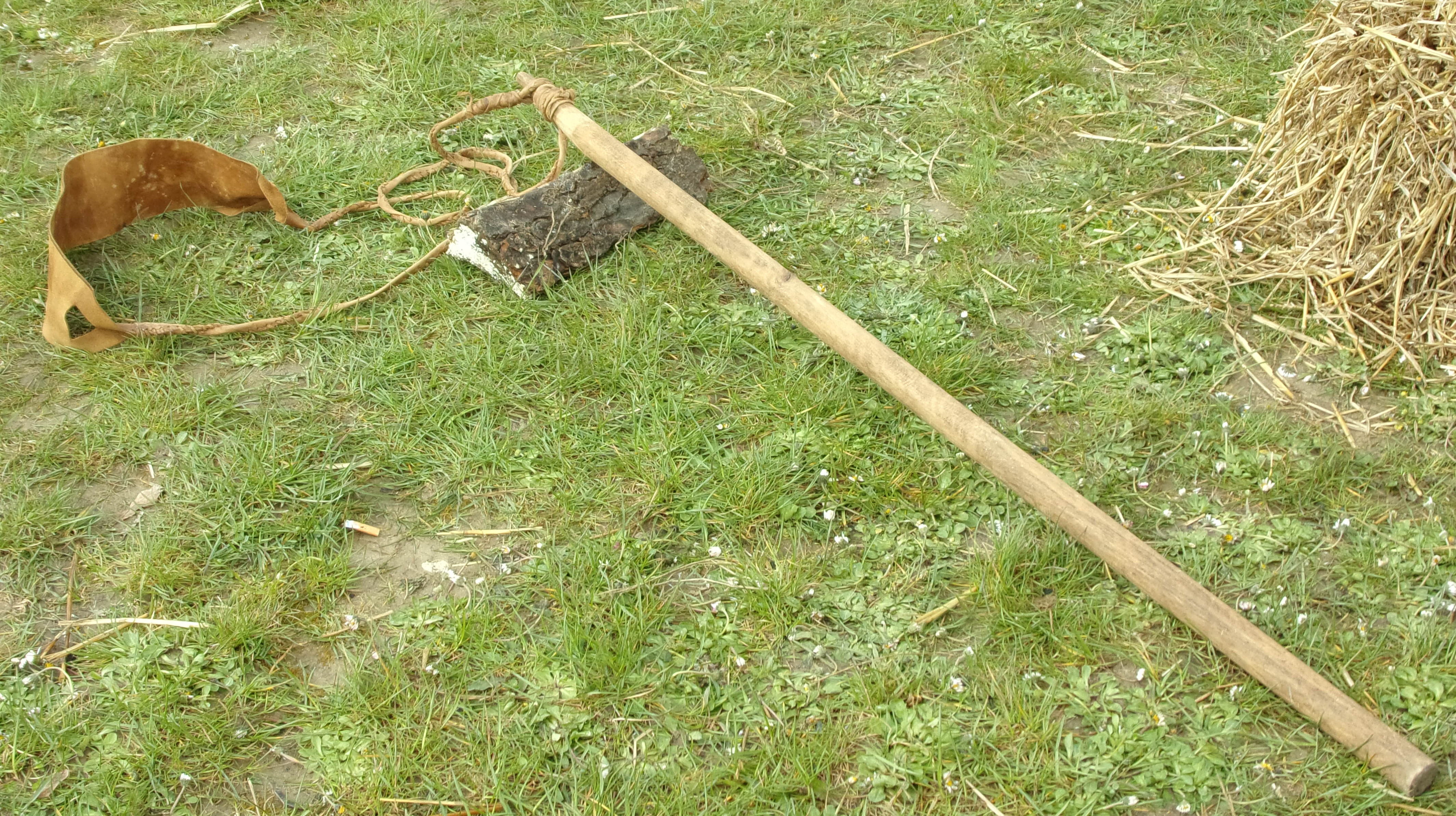 arme de La Compagnie de Routiers. Weapon from " La Compagnie des Routiers "